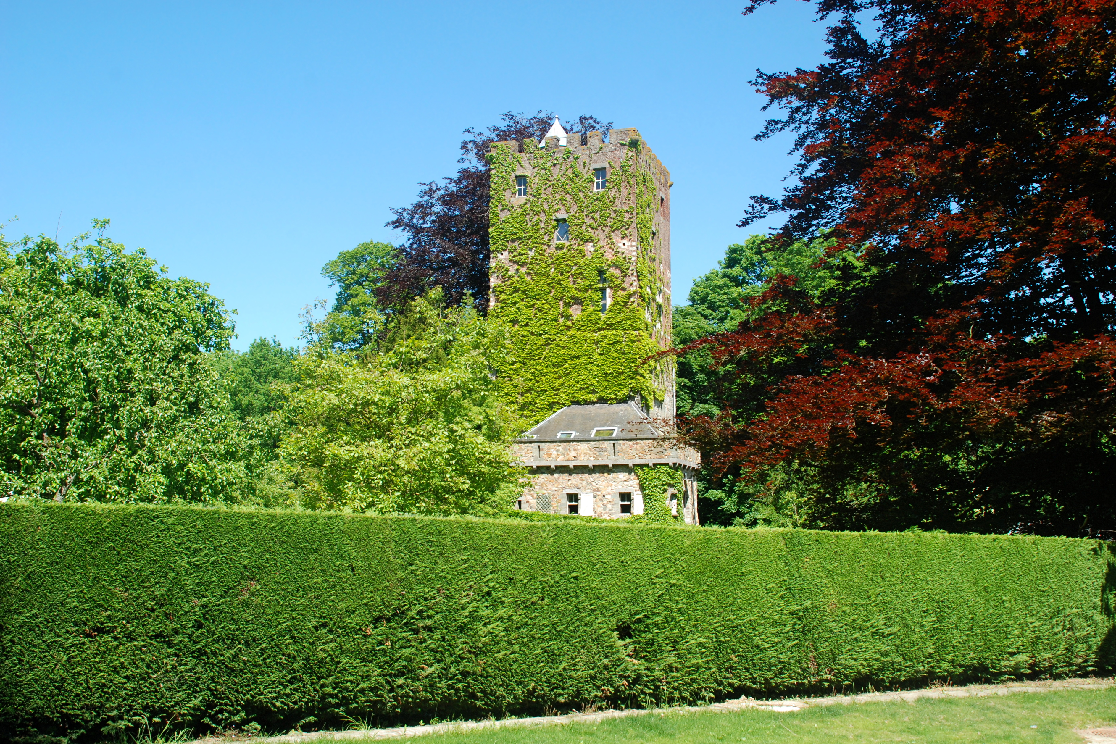 Belgique - Brabant wallon - Mont-Saint-Guibert - Hévillers - Donjon de Bierbais